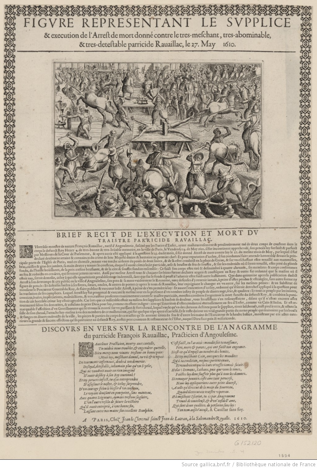 Figure représentant le supplice de Ravaillac, assassin d'Henri IV